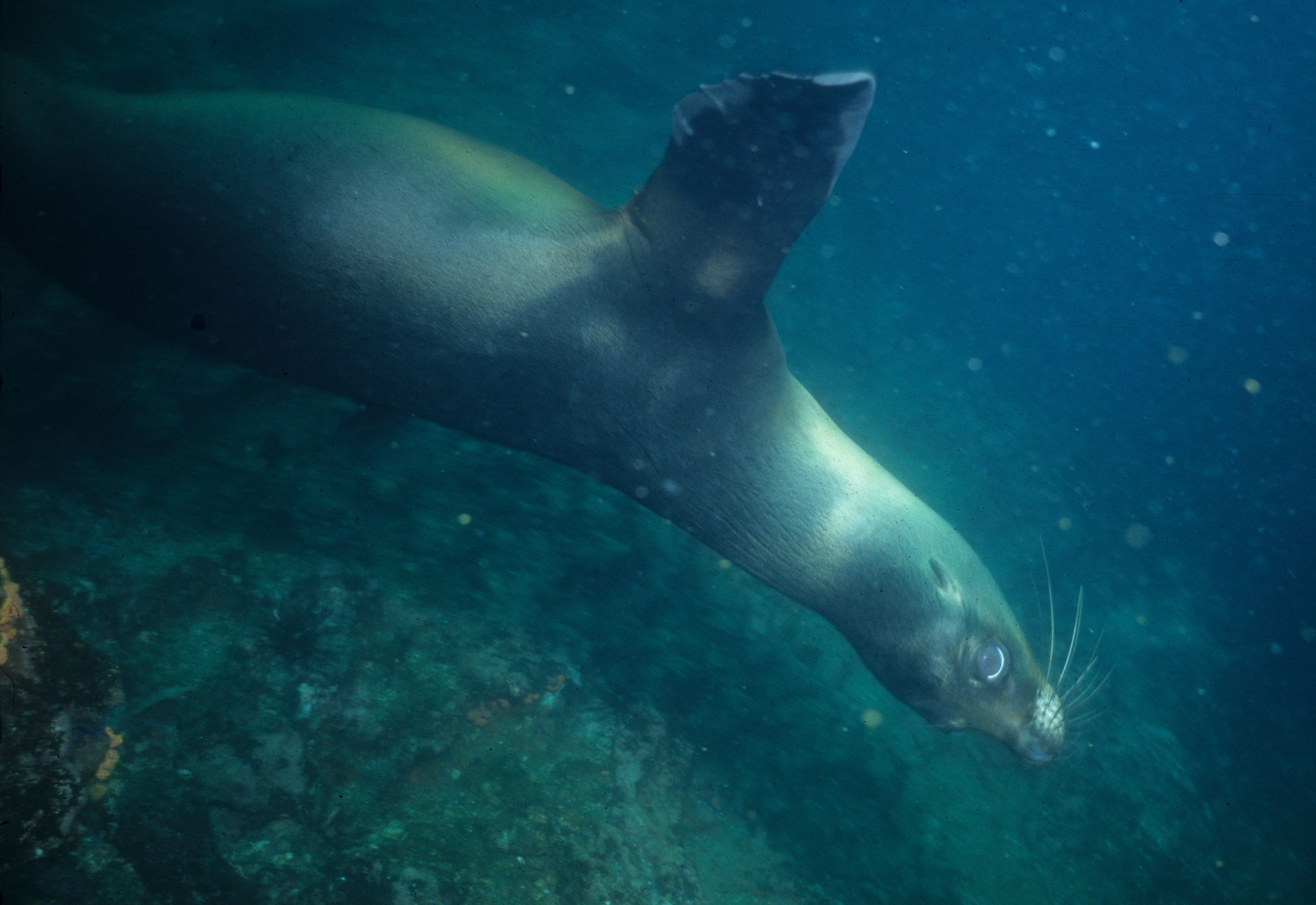 Galápagos sealion: underwater